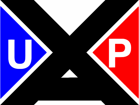 Unidad Popular (también conocido por el acrónimo UP) fue una coalición electoral de partidos políticos de izquierda y partidos socialistas de Chile que llevó a la Presidencia de la República a Salvador Allende.